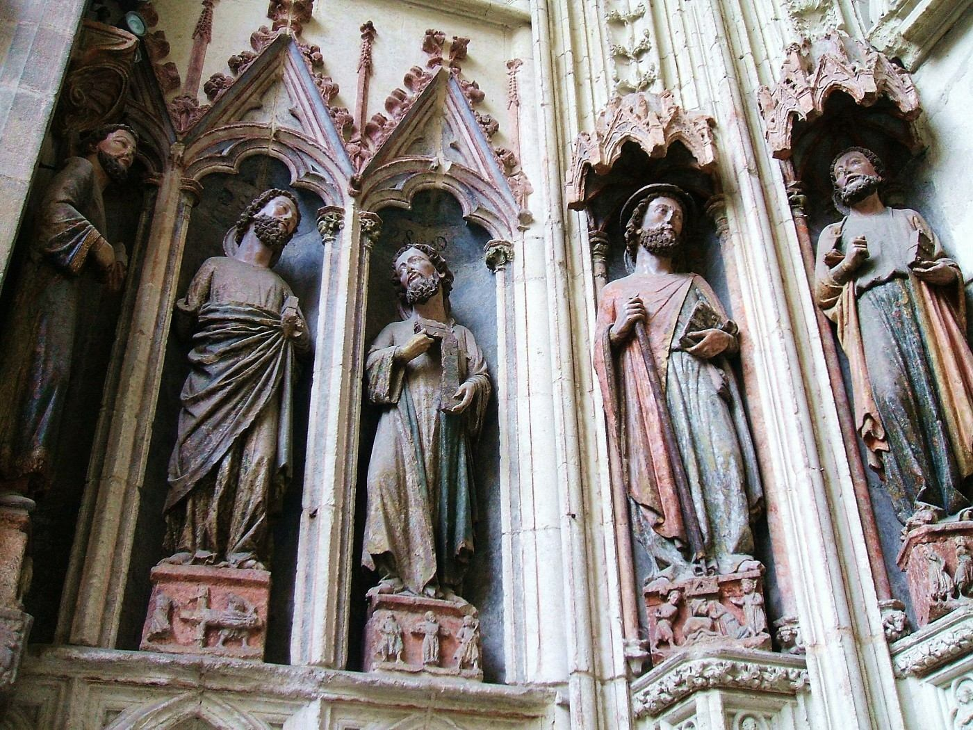 Apostolado del Pórtico Viejo, iglesia de San Pedro Apóstol, Vitoria-Gasteiz (s-XIV)